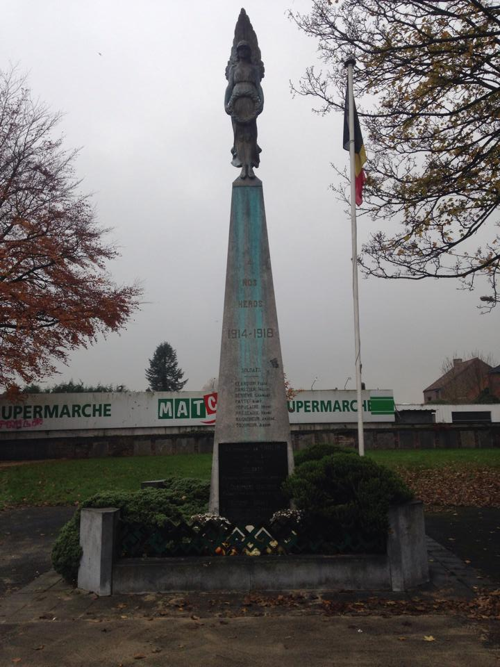 Le monument de nos jours.